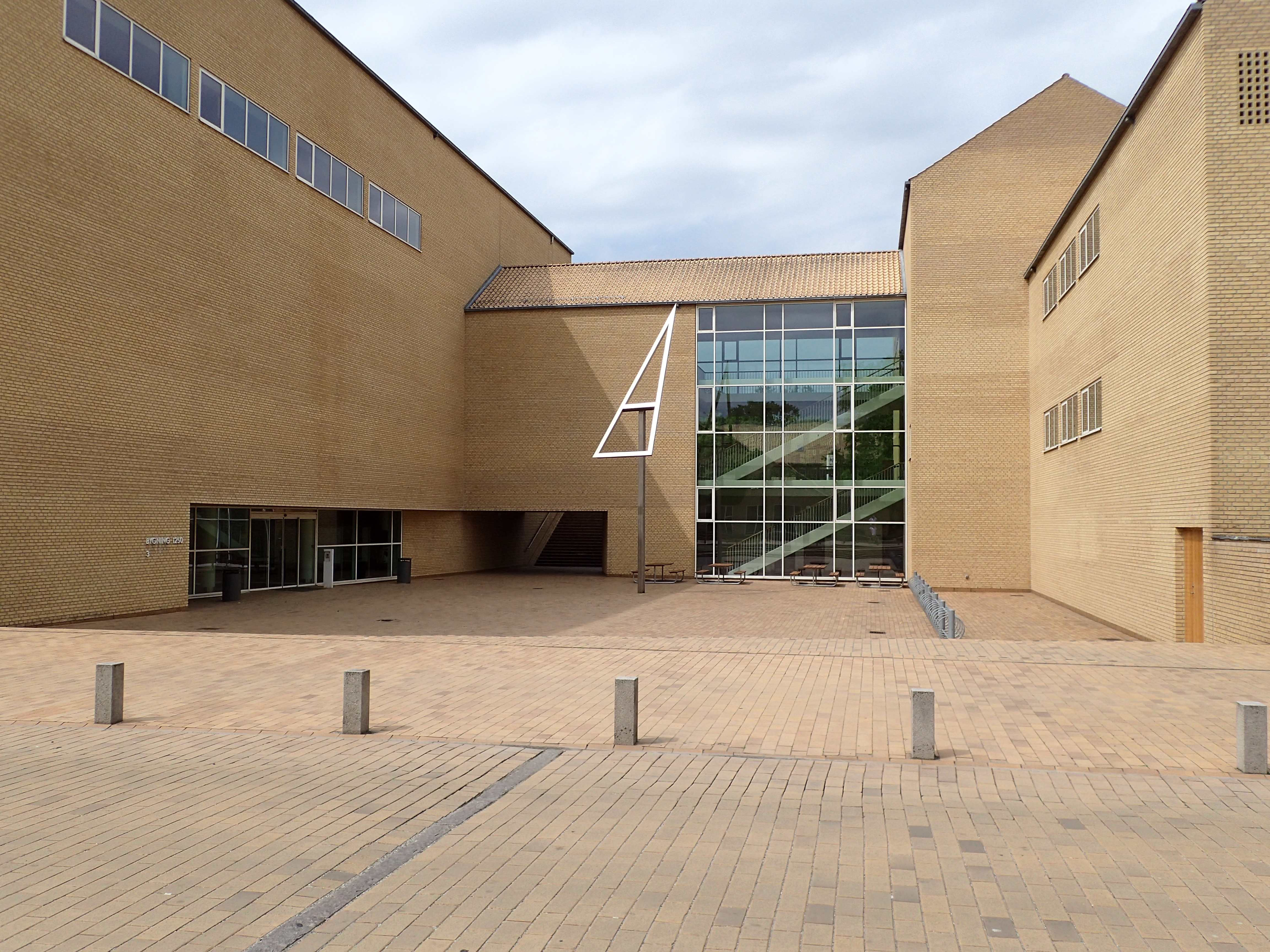 Søauditorierne, forplads, solur og indgang.